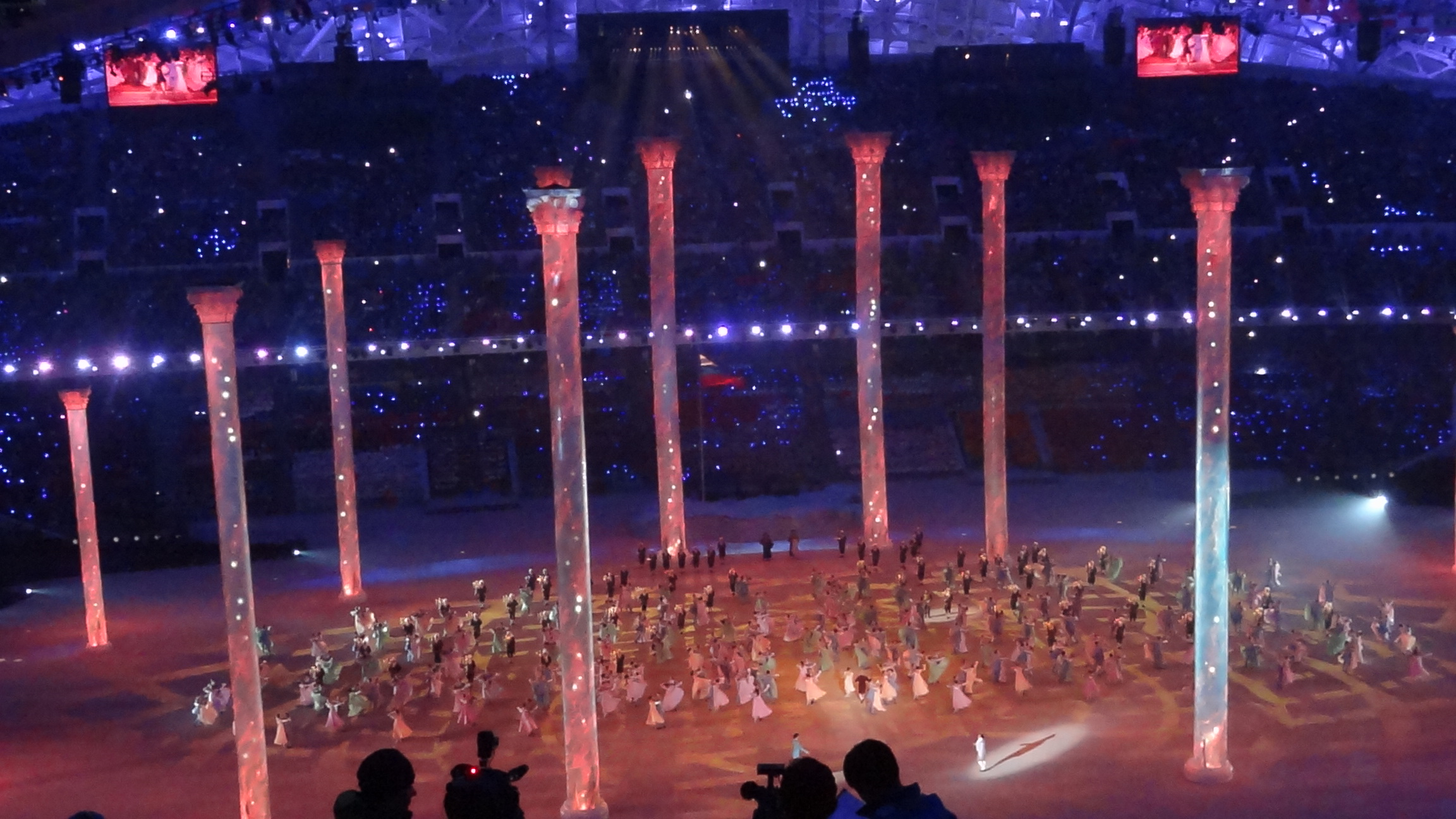 На Церемонии открытия XXII зимних Олимпийских игр в Сочи. 7 февраля 2014 года.